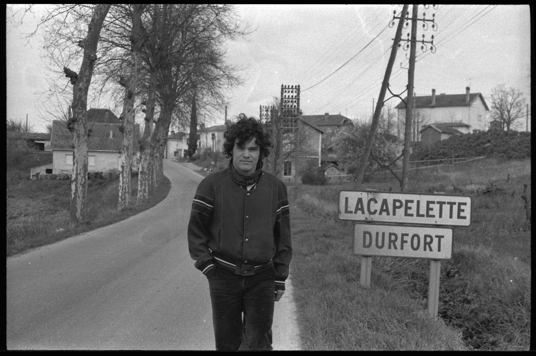 Durfort-Lacapelette (Tarn-et-Garonne). 5 Février 1975. Vue de Pierre Blaise devant l'entrée du village.